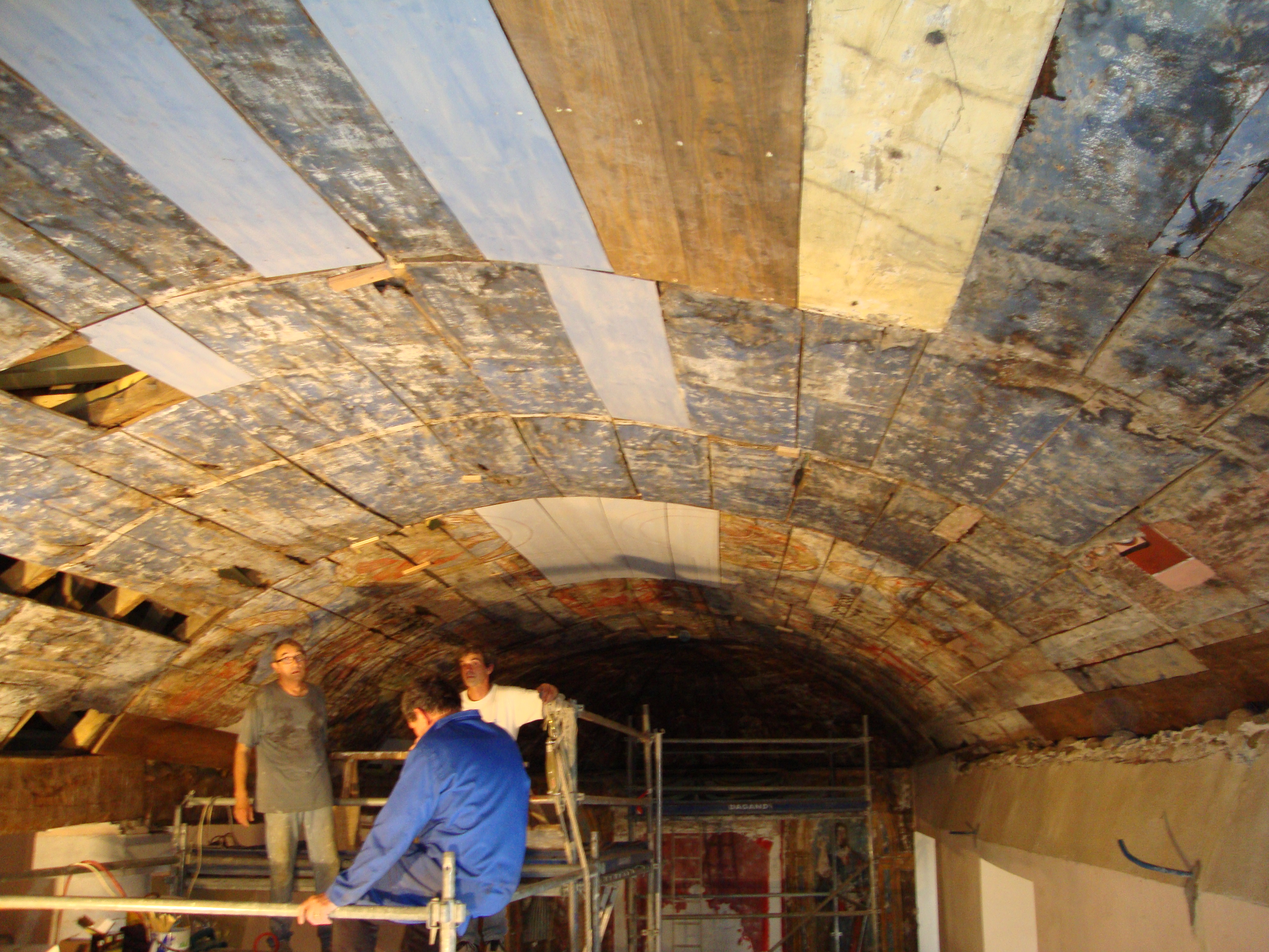 Espès (Espès-Undurein, (Pyr-Atl, Fr) Restauration du plafond peint de l'église